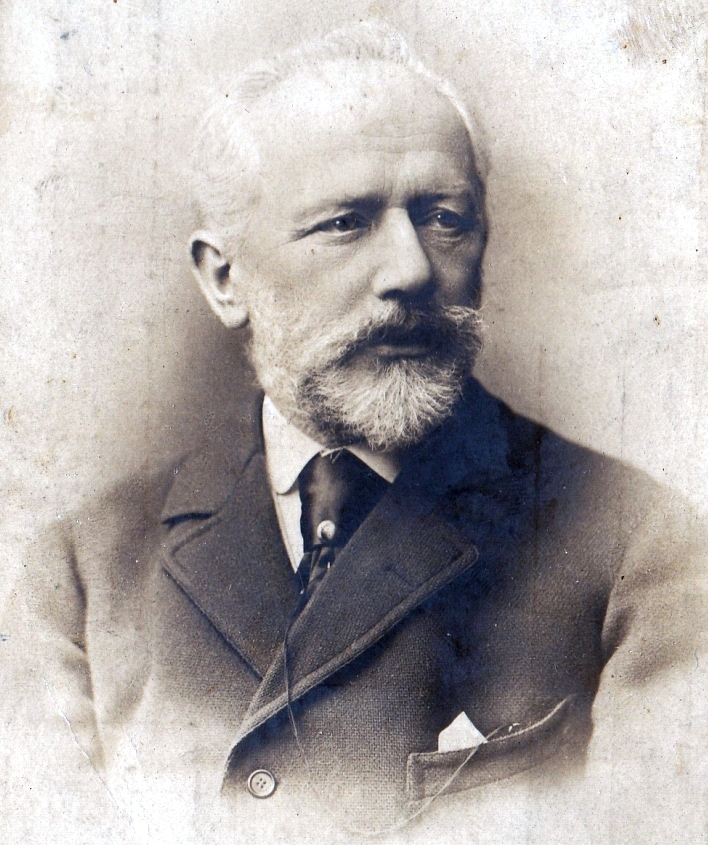 Чайковский, Пётр Ильич